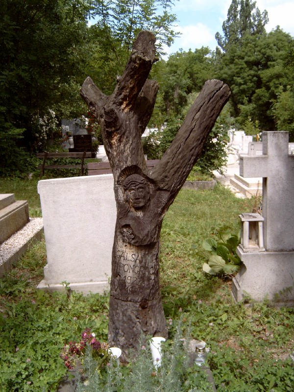 Galsai Pongrác sírja Budapesten. Farkasréti temető: 22/1-1-20 [szobrász: Nemes Ferenc].